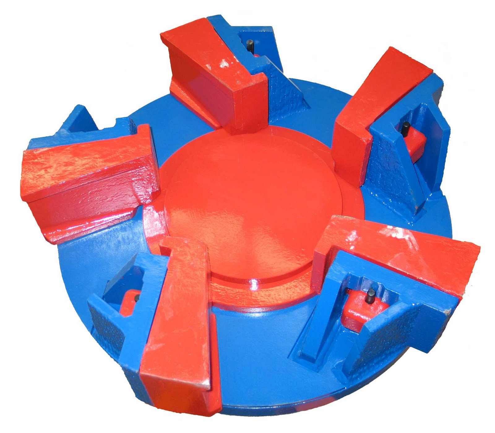 Используется для повышения крупности исходного питания при центробежно-ударном дроблении